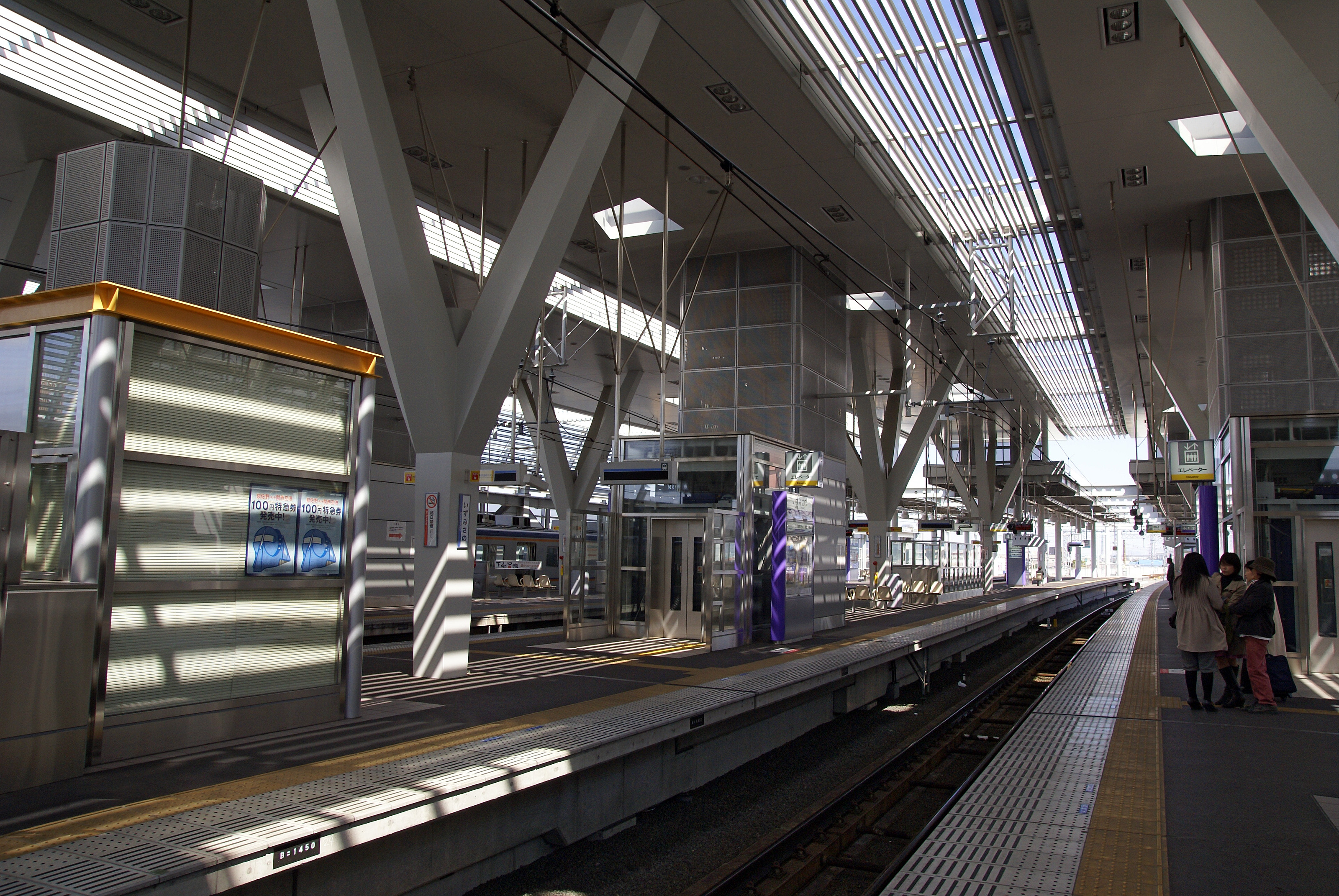 Izumisano Station in Izumisano, Osaka prefecture, Japan